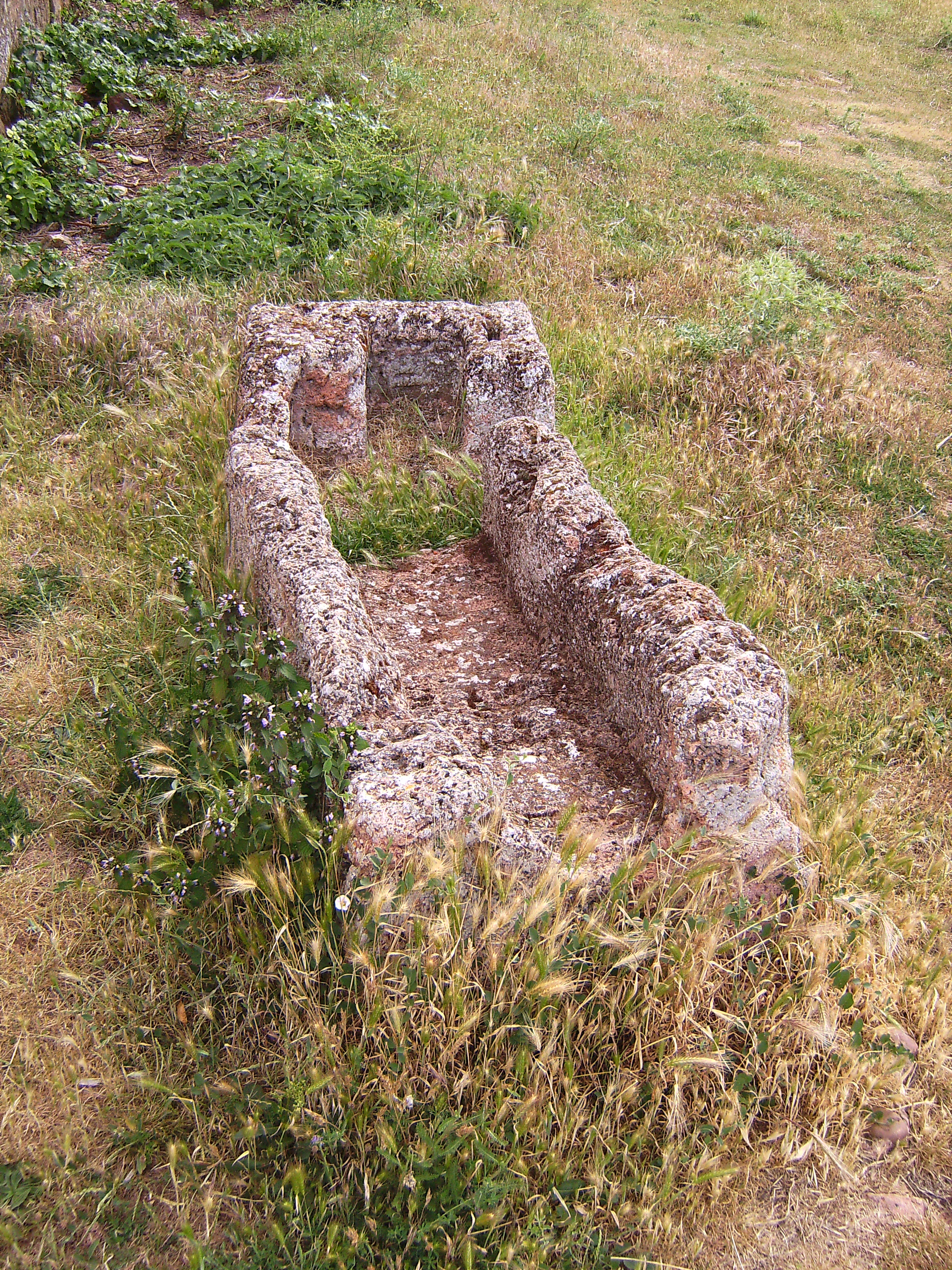 Tiermes - Iglesia de Santa Maria (Sarcofago)